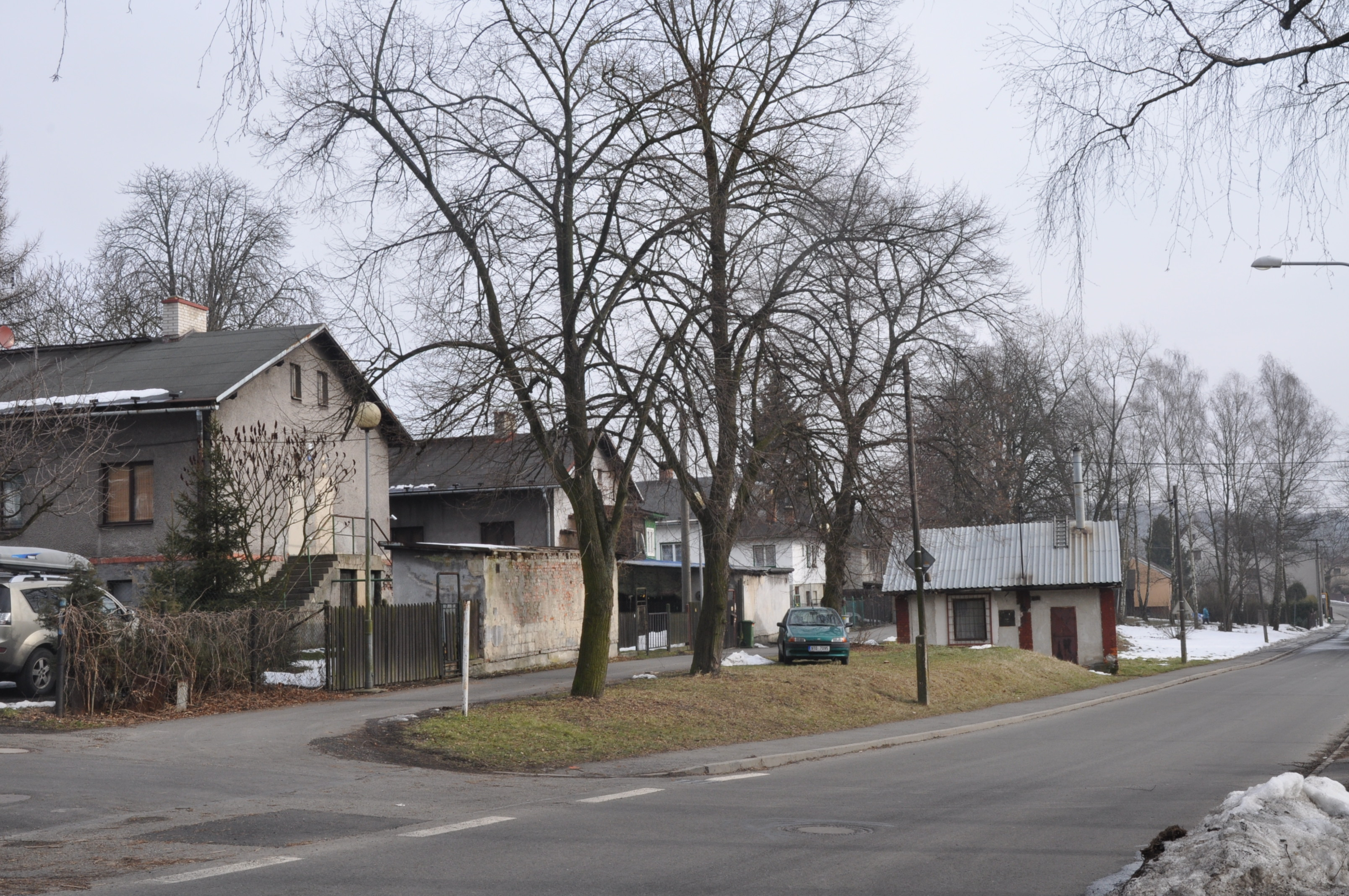 Ferdinandova kolonie se zachovalou veřejnou prádelnou. Ulice Briketářská, Ostrava-Michálkovice